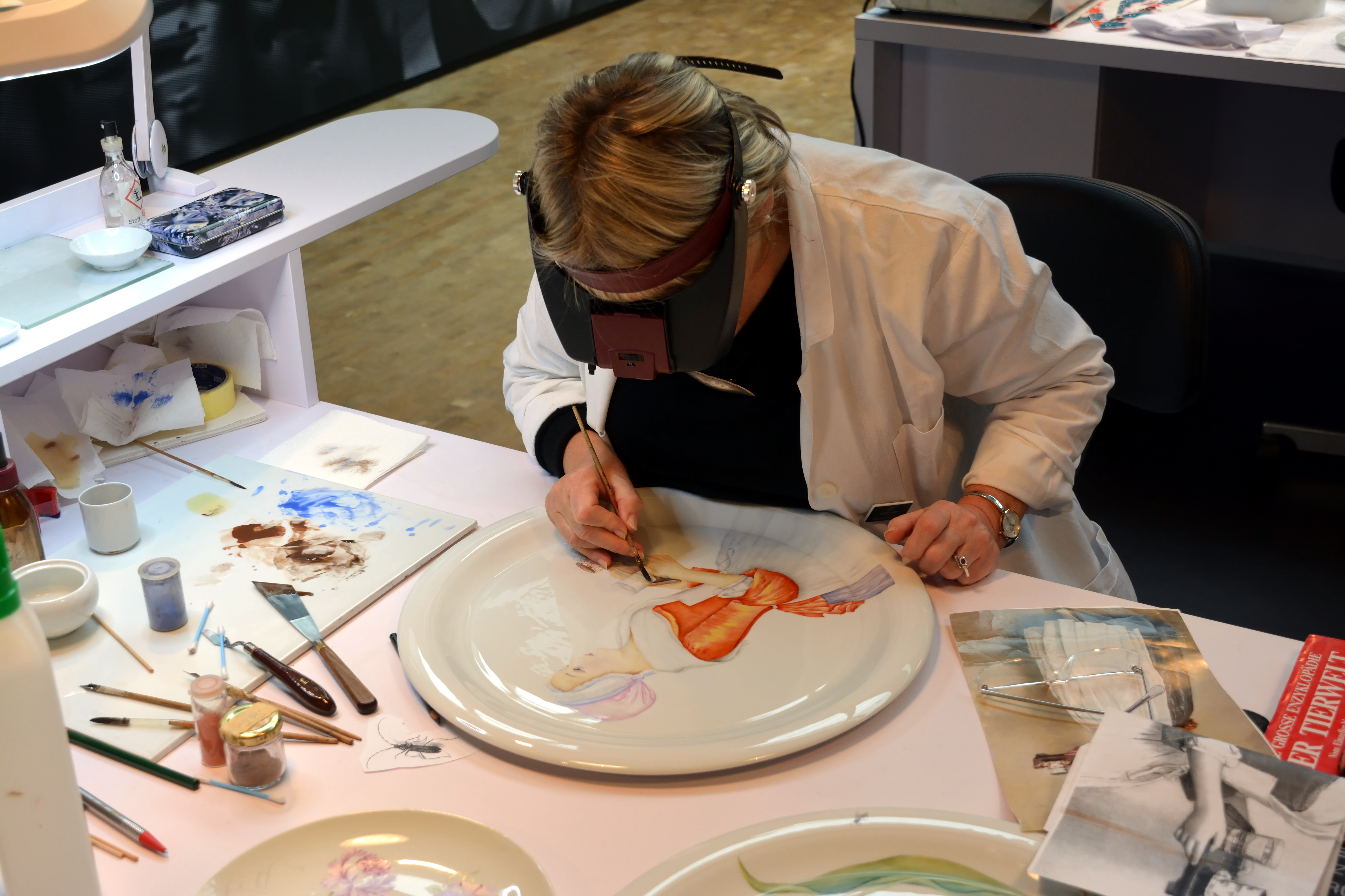 Impressionen vom Porzellanmuseum Schloss Fürstenberg Besucherwerkstatt, Station 4: Handmalerei. Bemalung eines Tellers nach der Pastellmalerei "Das Schokoladenmädchen". Allerdings wird die rechte Tasse auf dem Tablett durch eine Tasse aus dem Angebot der Manufaktur ersetzt [1].